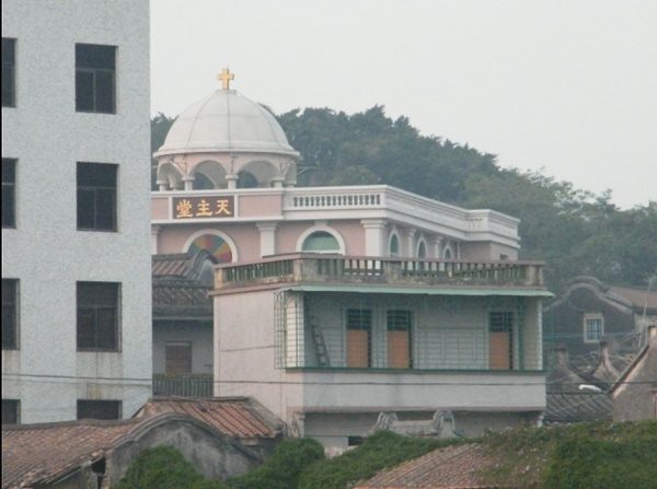 达濠澳头天主堂